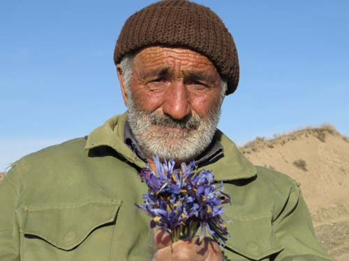 Novruz gülü-Kəndli-Fotoşəkili